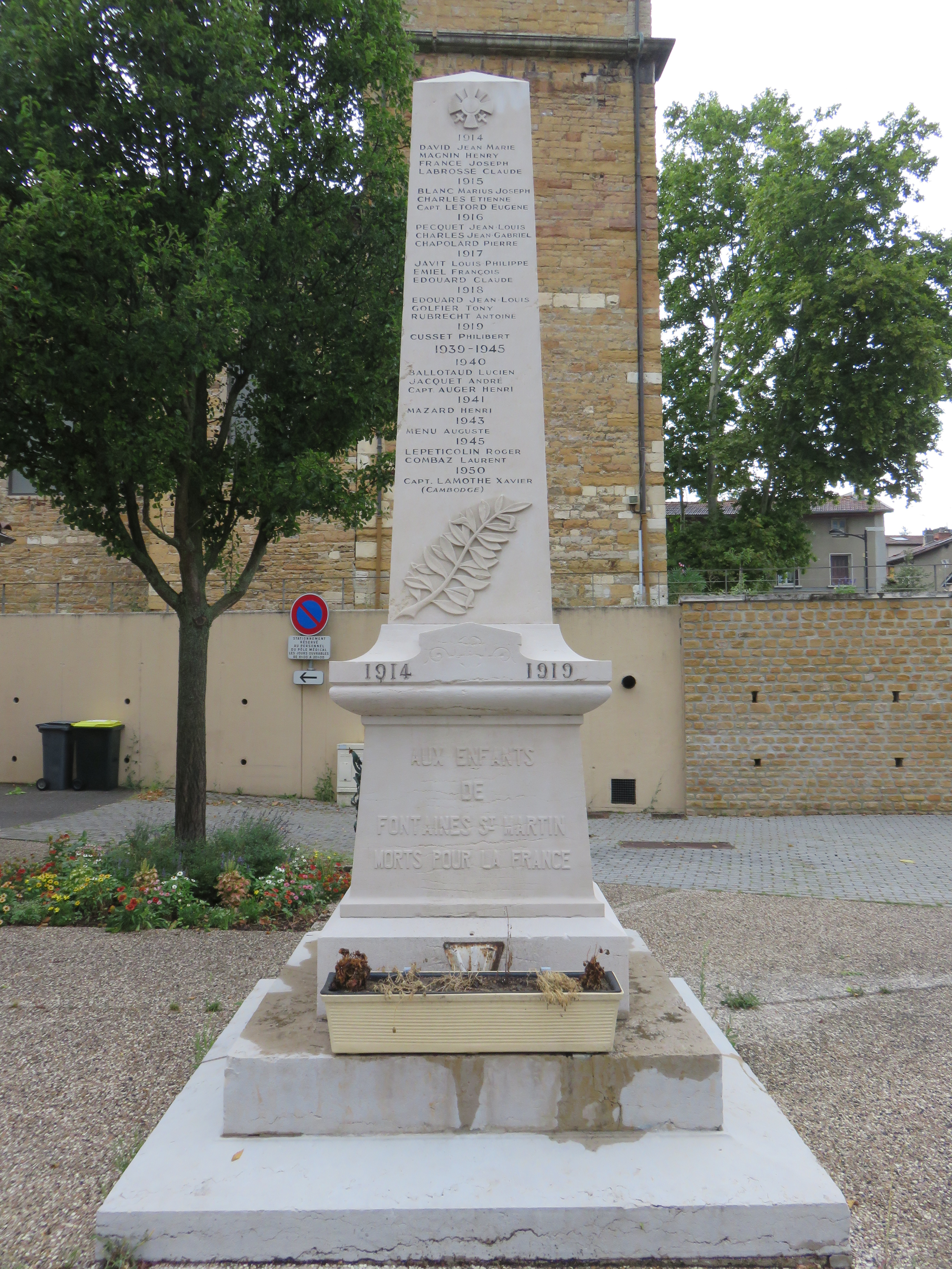 Monument aux morts de Fontaines-Saint-Martin (Rhône, France).